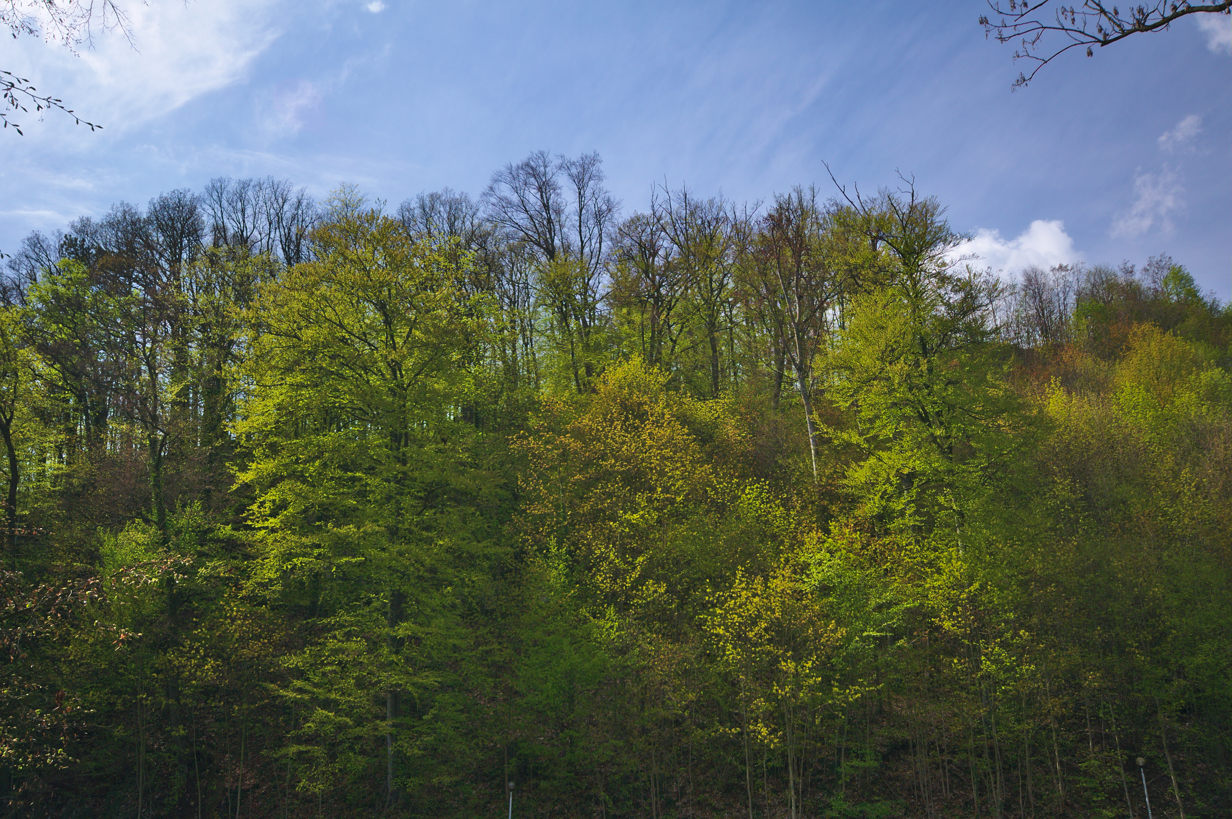 Národní přírodní památka Zbrašovské aragonitové jeskyně, okres Přerov